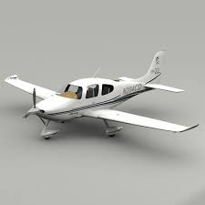 Model pesawat Cirrus SR22.